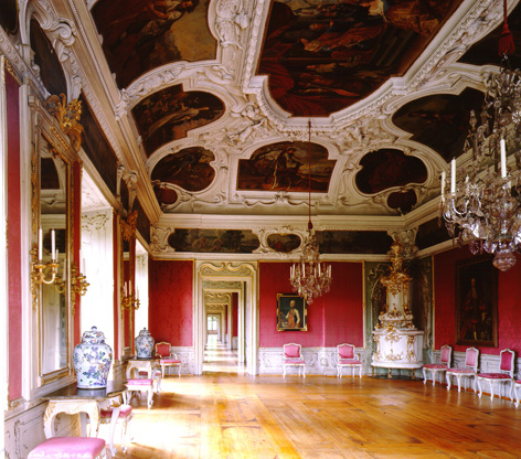 Schloss Eggenberg, Raumflucht in der Beletage